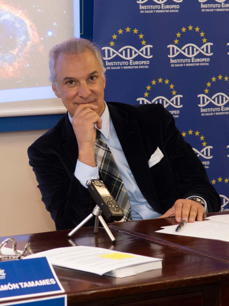 Manuel de la Peña, Presidente de Instituto Europeo de Salud y Bienestar Social